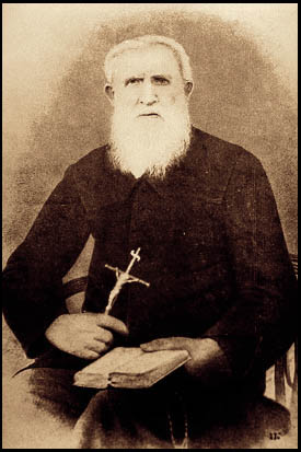 João Adão (Moses) Noschang